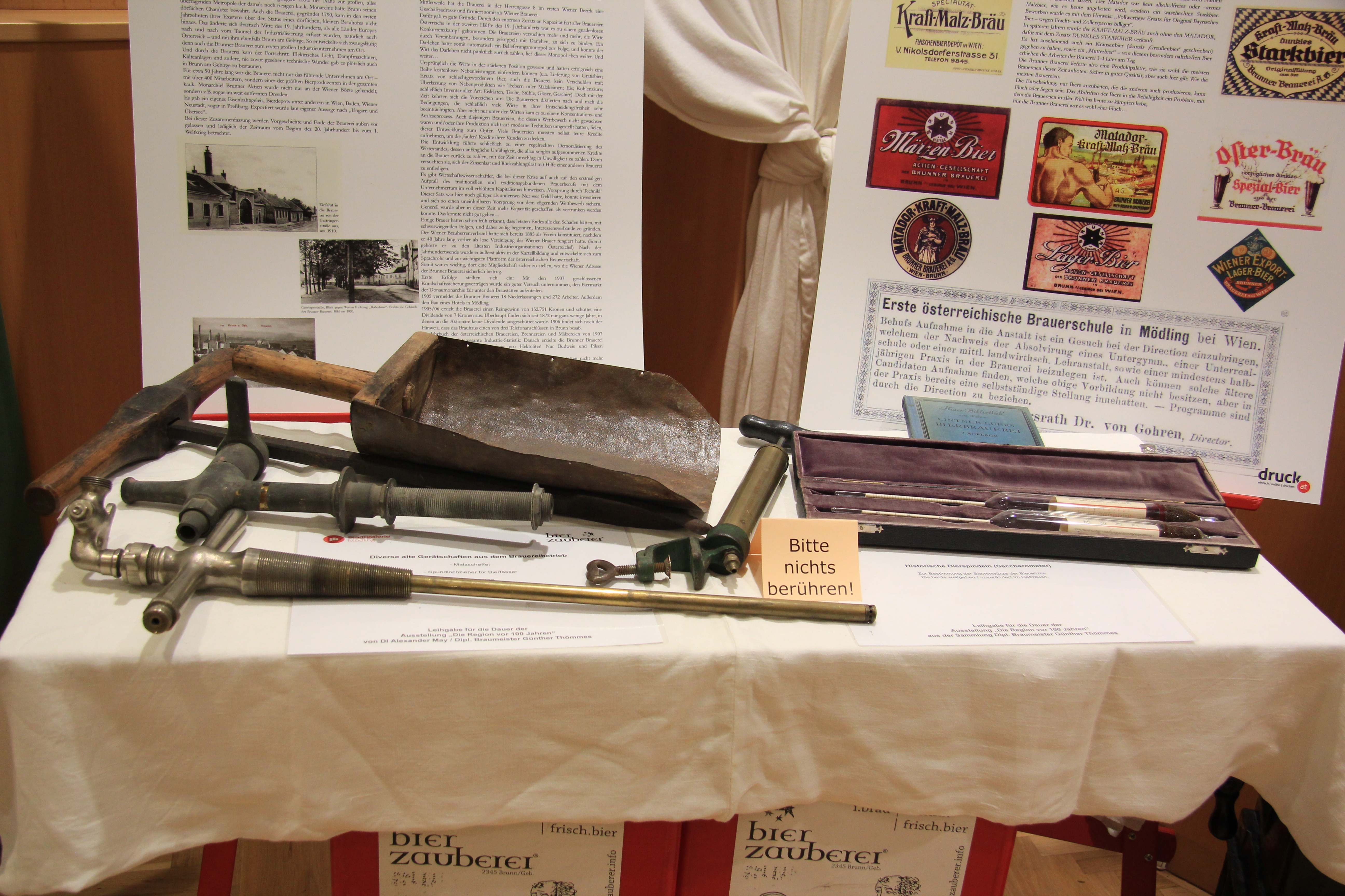 Ausstellungsstück(e) bei der Ausstellung „Die Region um 1914“ in der Stadtgalerie Mödling über die Brunner Brauerei